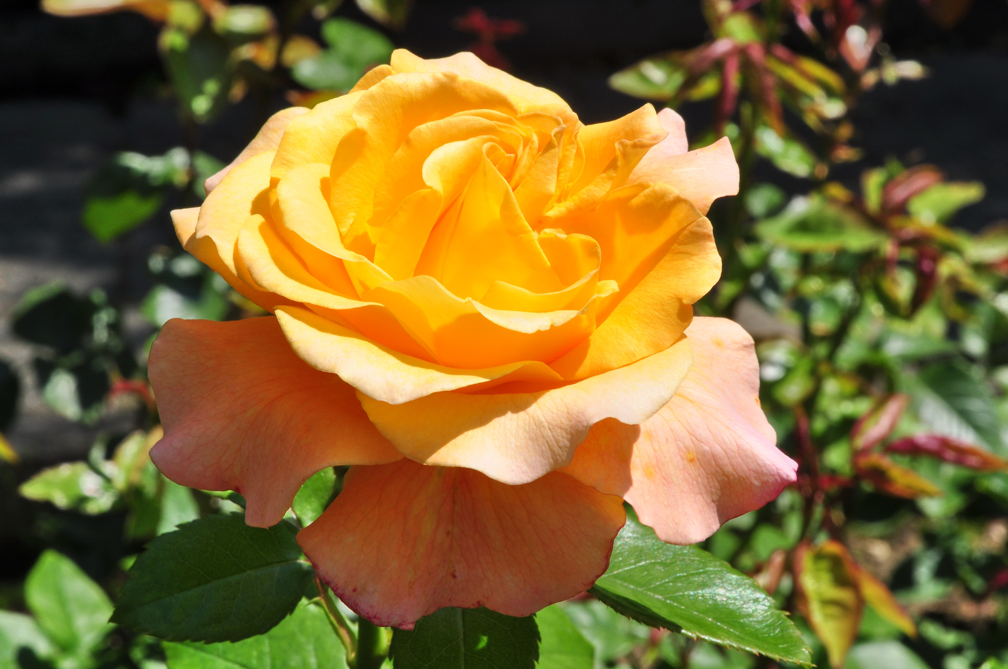 Adolf Horstmann (TH Kordes 1971) Duftrosengarten in Rapperswil (Switzerland)